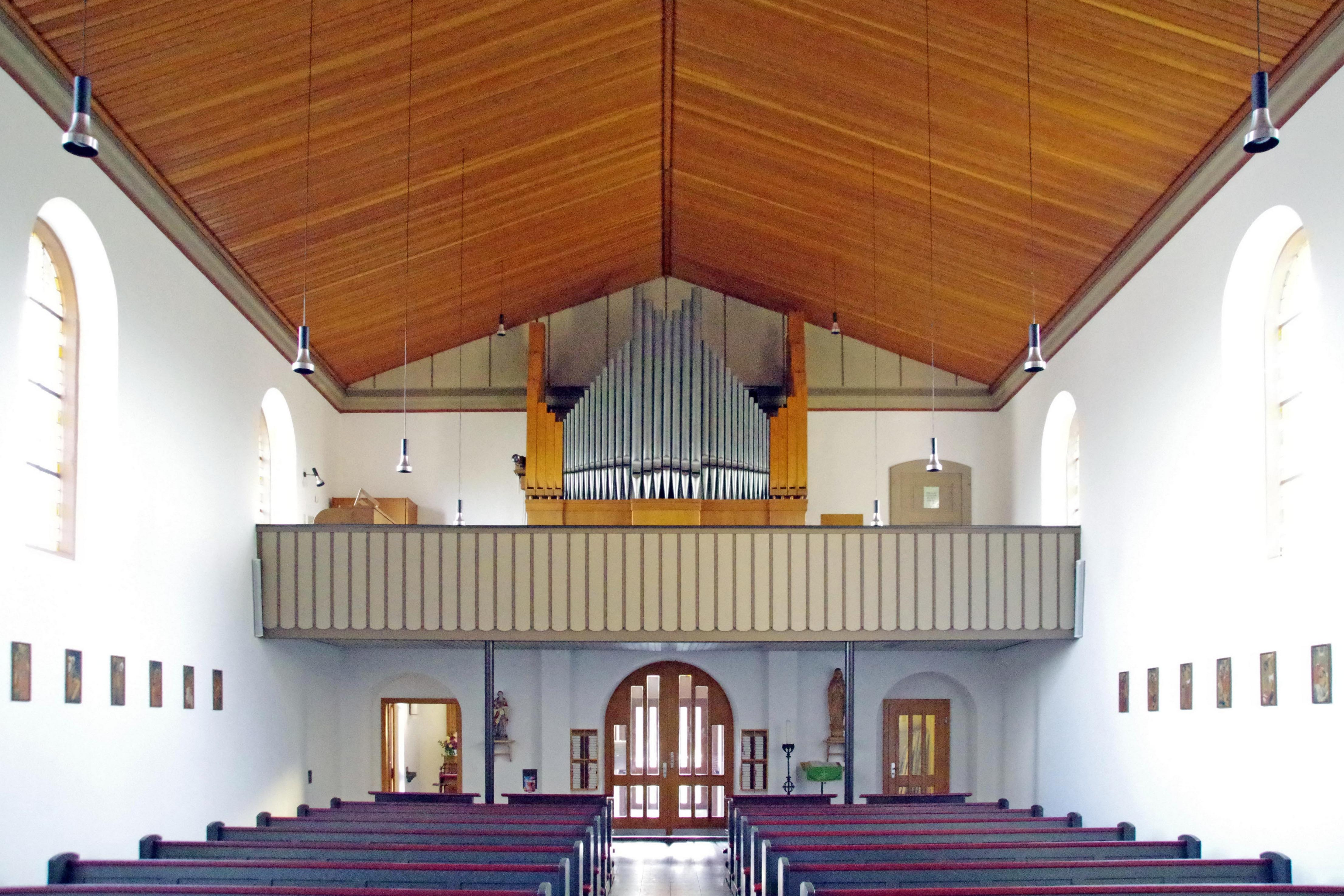 St. Hubertus (Udenbreth), Innenraum nach Westen mit Orgelempore